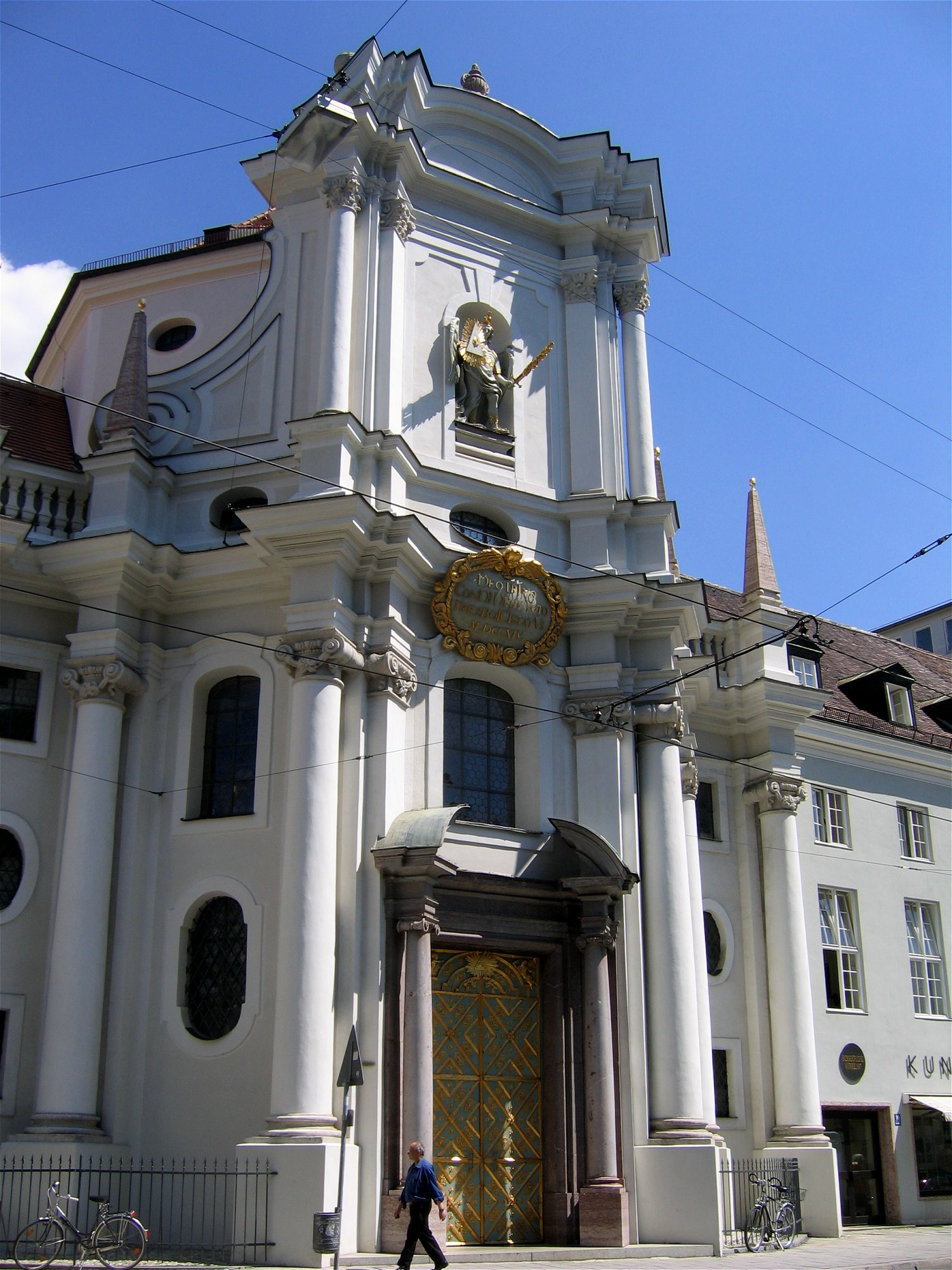 Dreifaltigkeitskirche in München, Fassade